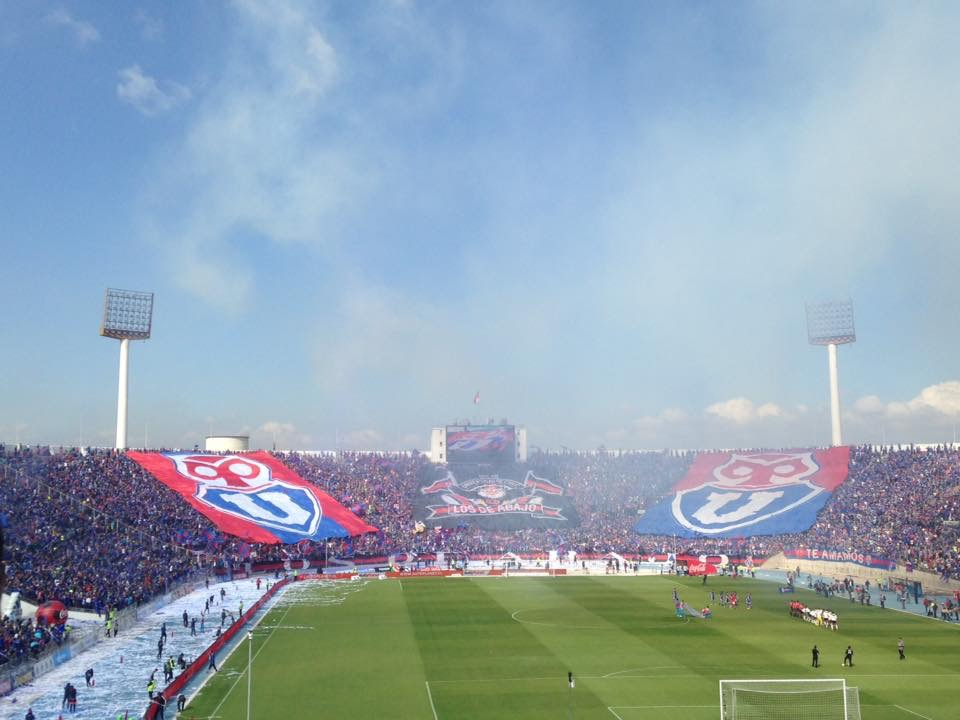 Vista hacia galería sur del Estadio Nacional en un súper clásico